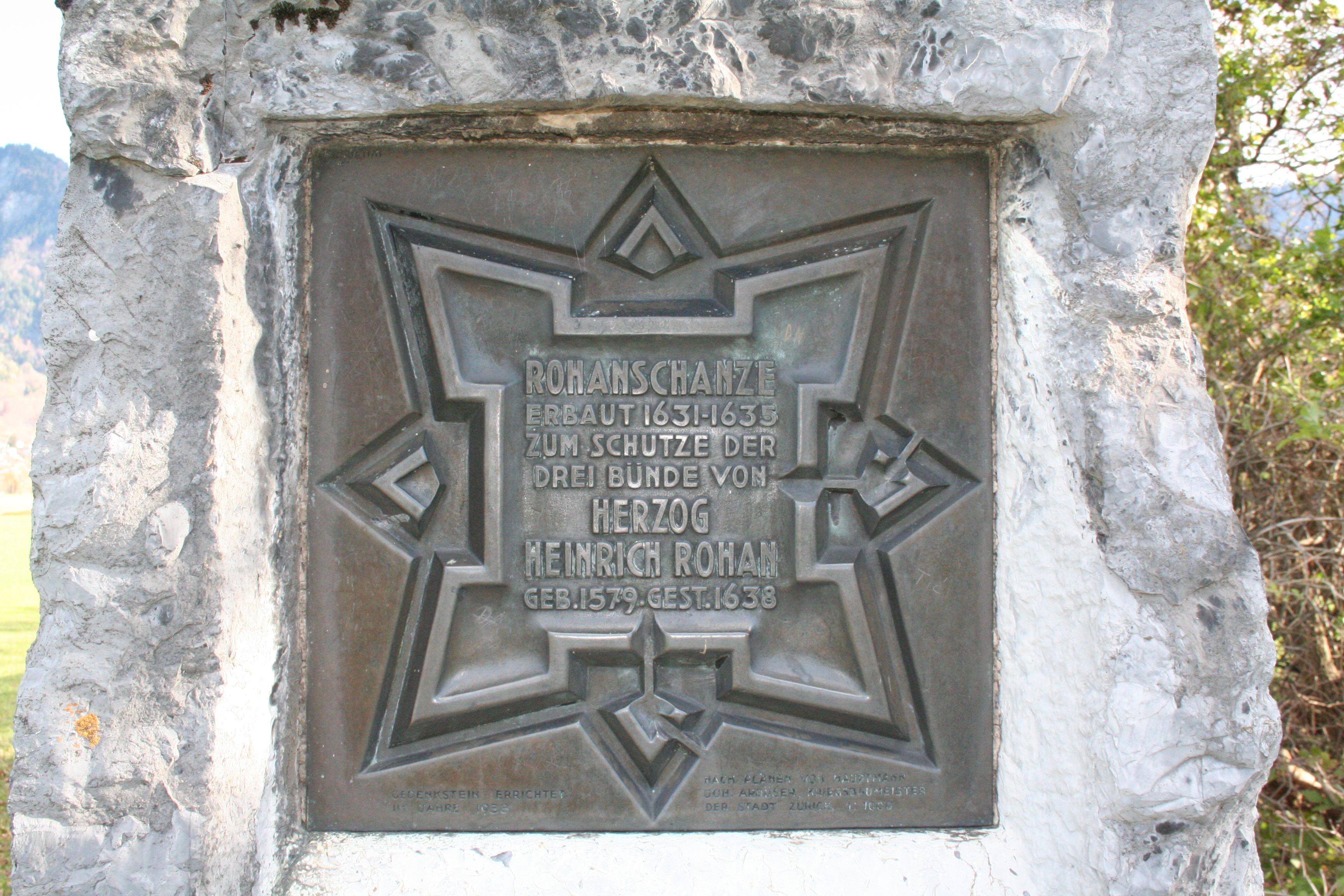 Rohanschanze bei Landquart Tafel auf dem Gedenkstein